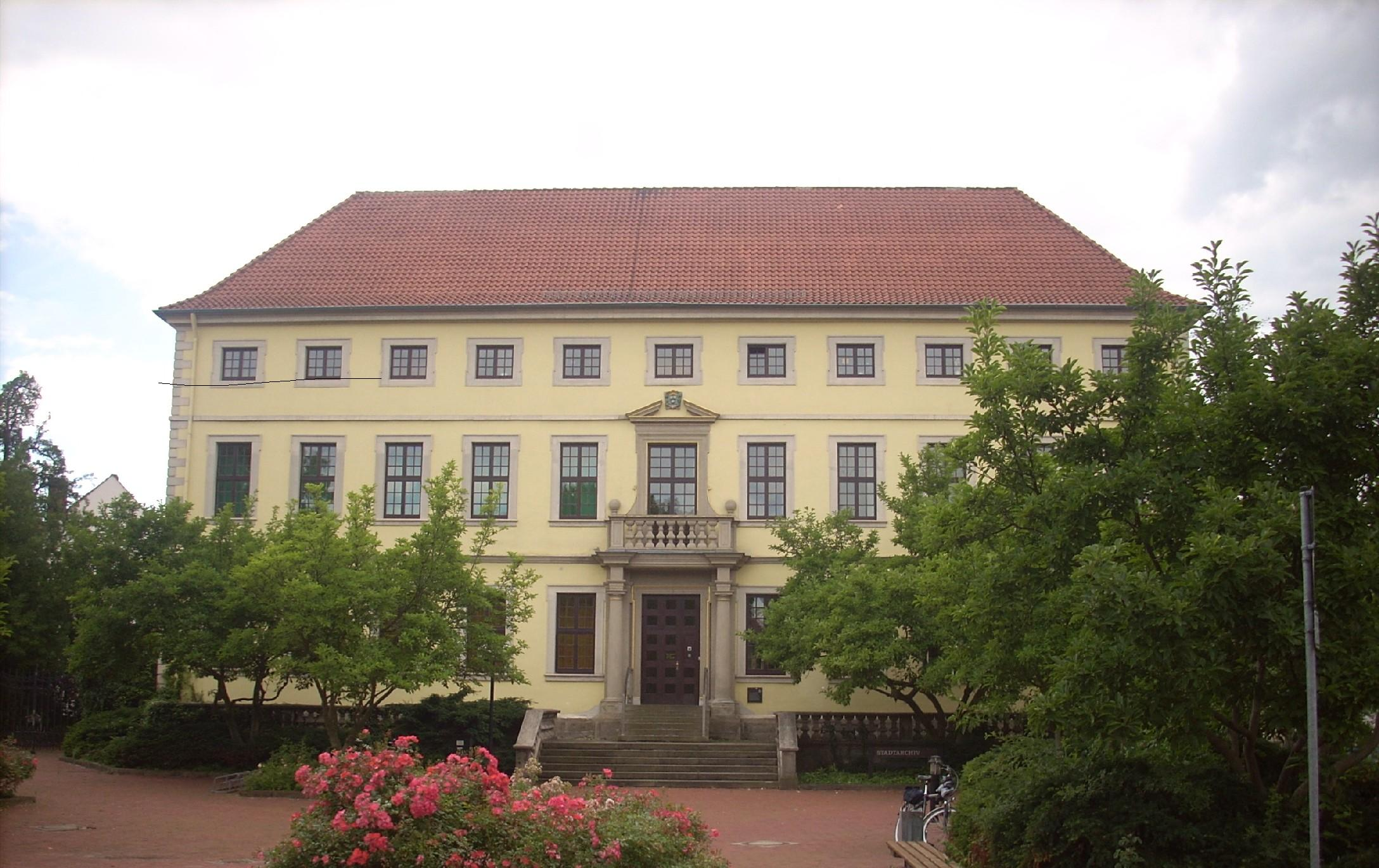 ehem. Haus der Landschaft, jetzt Stadtarchiv, Hildesheim